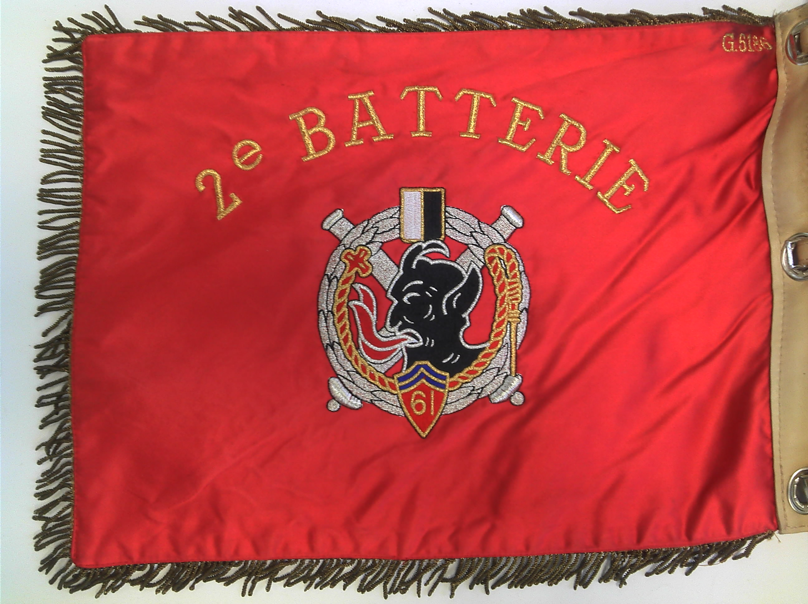 Fanion de la 2e batterie